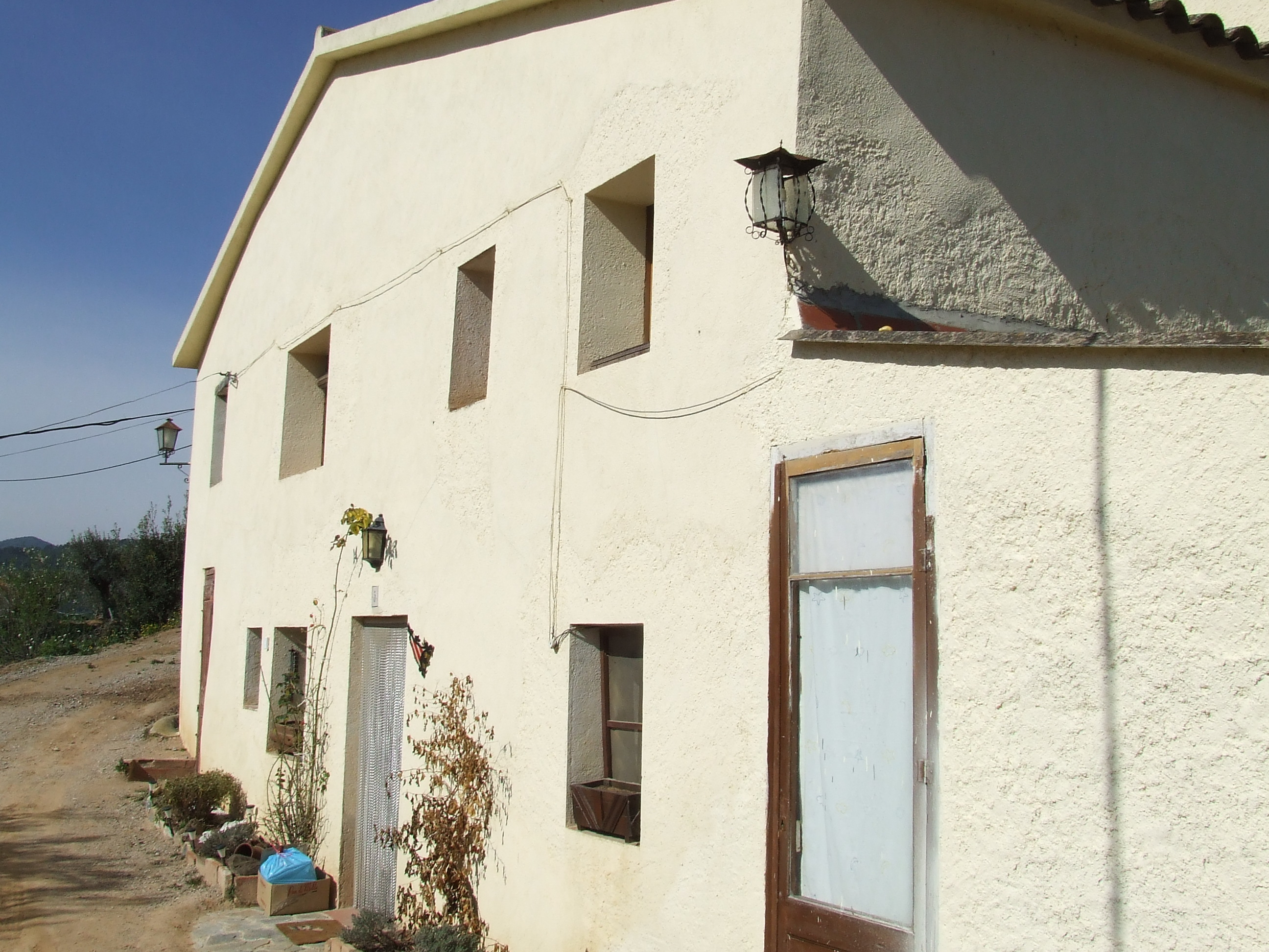 Can Mestre Lluc, al Veïnat (Bigues, Bigues i Riells, Vallès Oriental).